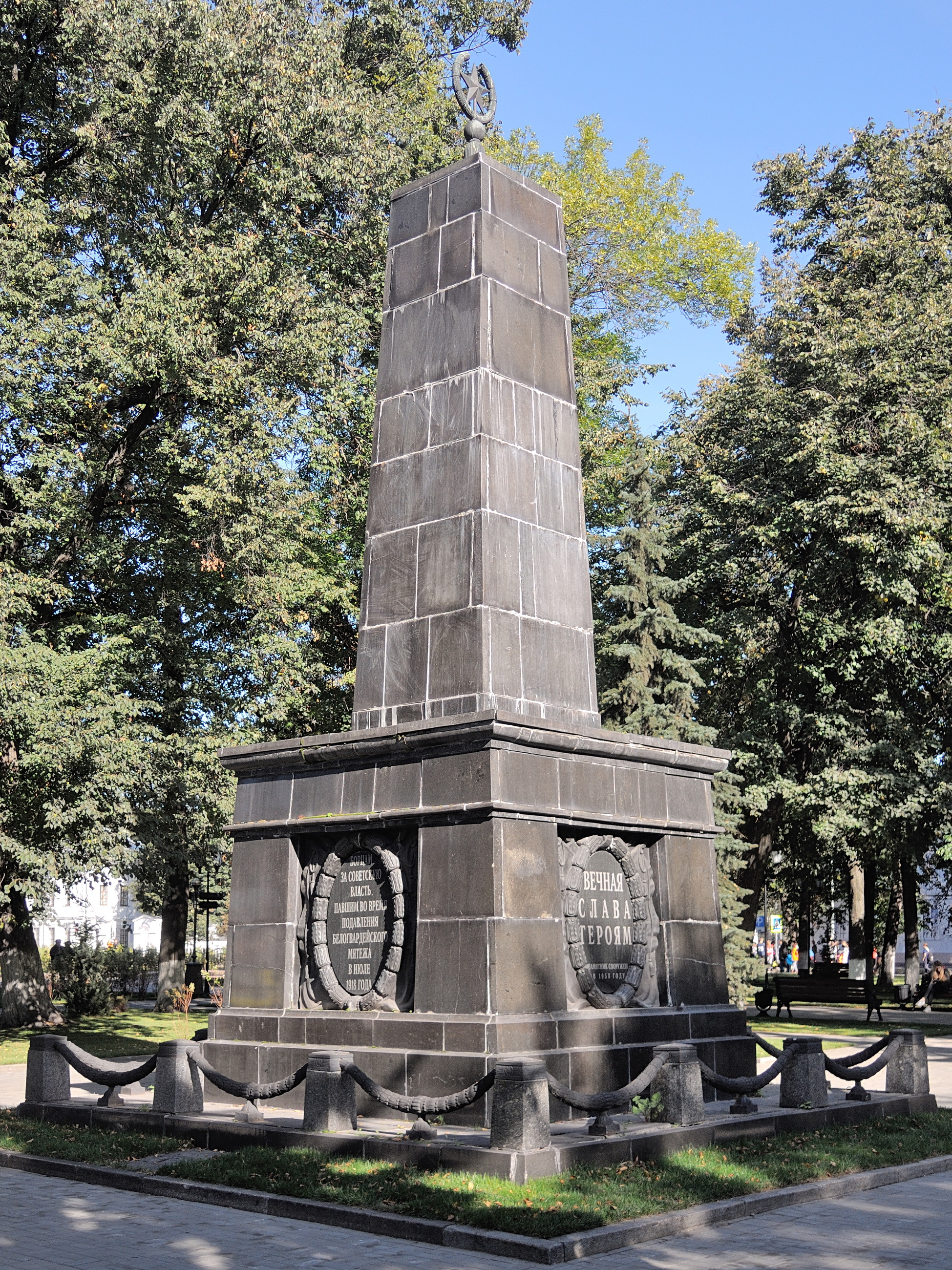 Памятник борцам за Советскую власть: площадь Челюскинцев, Ярославль, Ярославская область